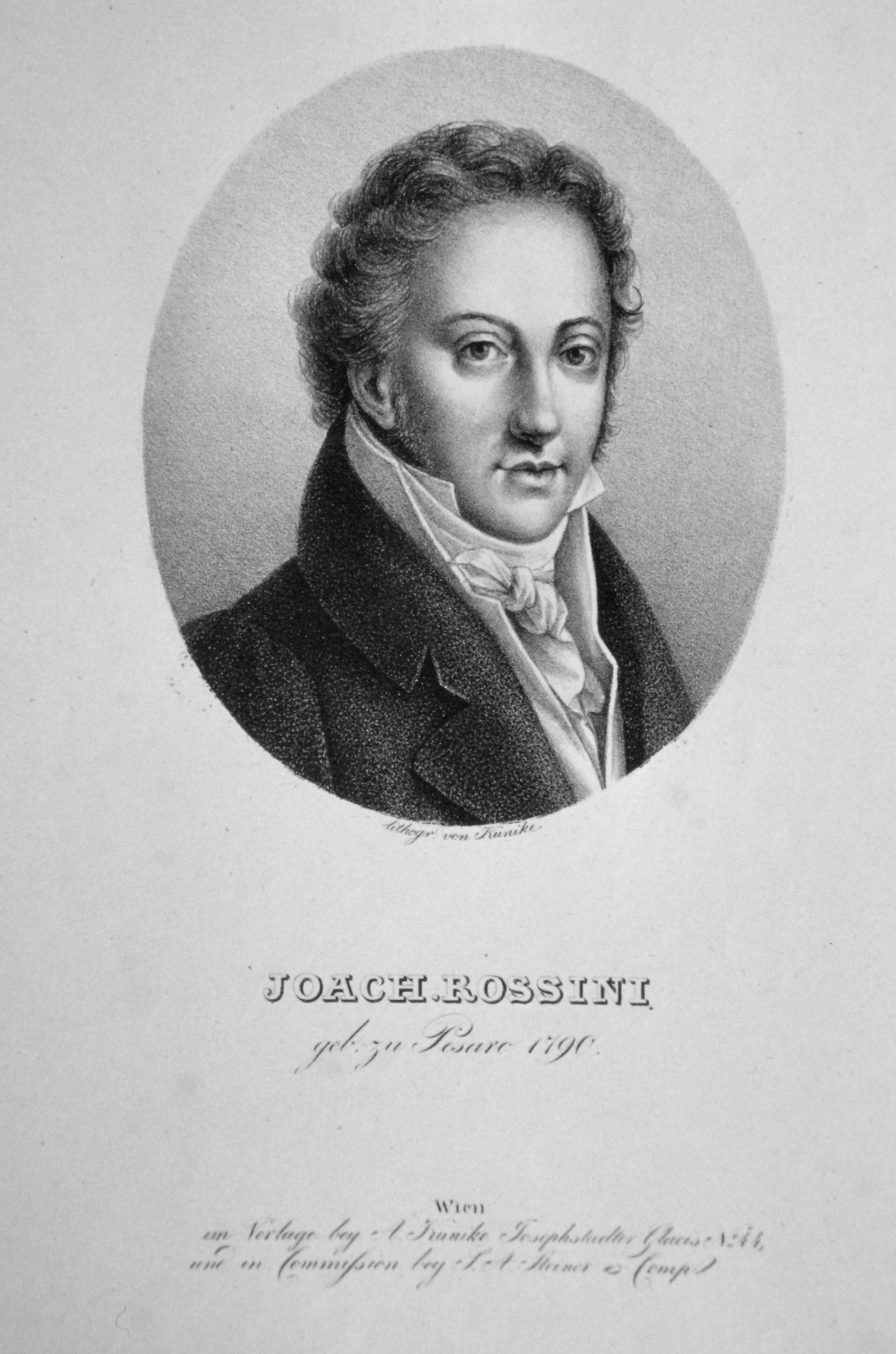 Gioachino Rossini (1792-1868), italienischer Komponist. Lithographie von Adolph Friedrich Kunike, ca.1820